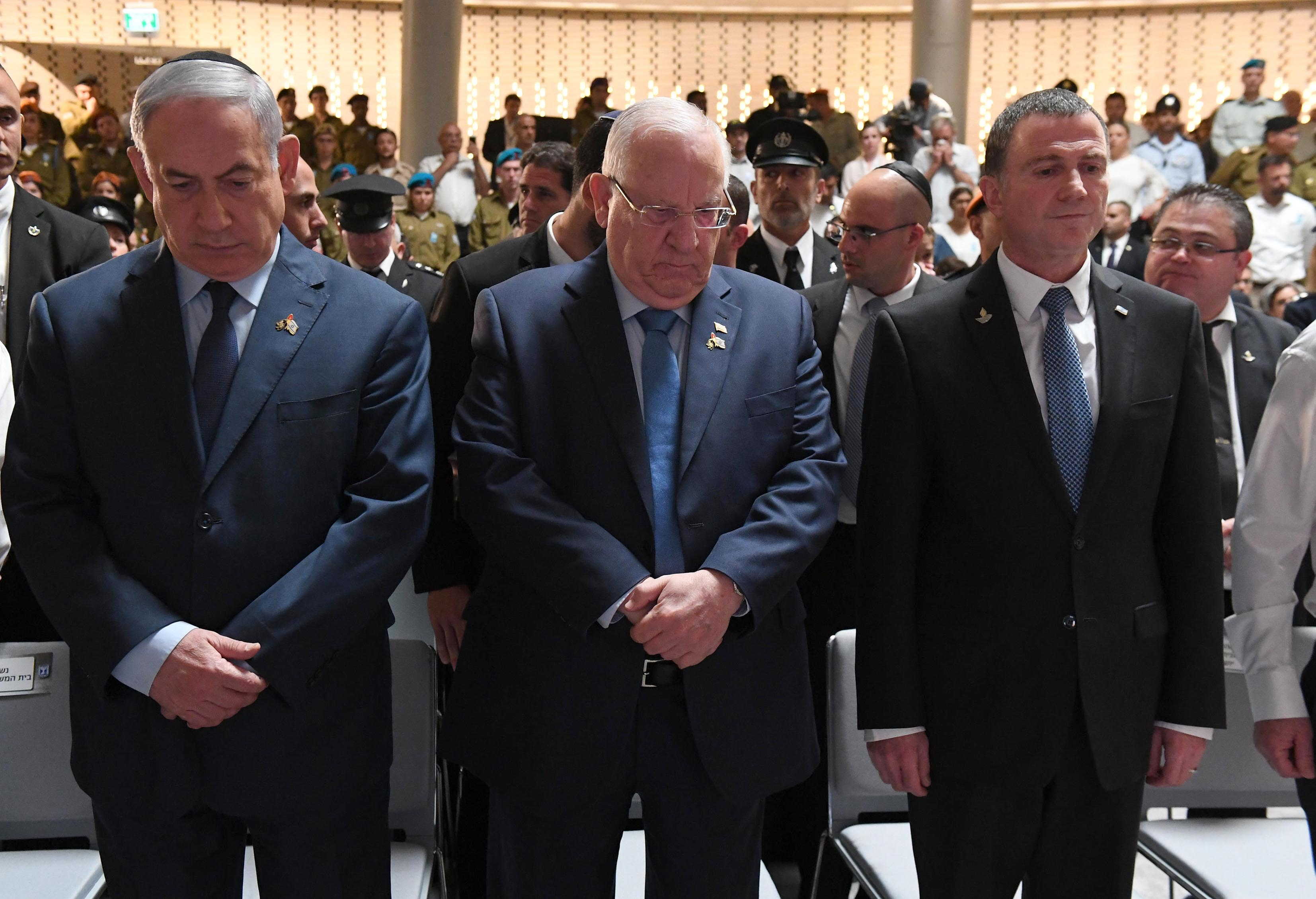 ראובן ריבלין נשיא מדינת ישראל בטקס האזכרה לחללי מערכות ישראל שהתקיים בחלקה הצבאית בהר הרצל מימין לשמאל: יולי אדלשטיין, ראובן ריבלין, בנימין נתניהו